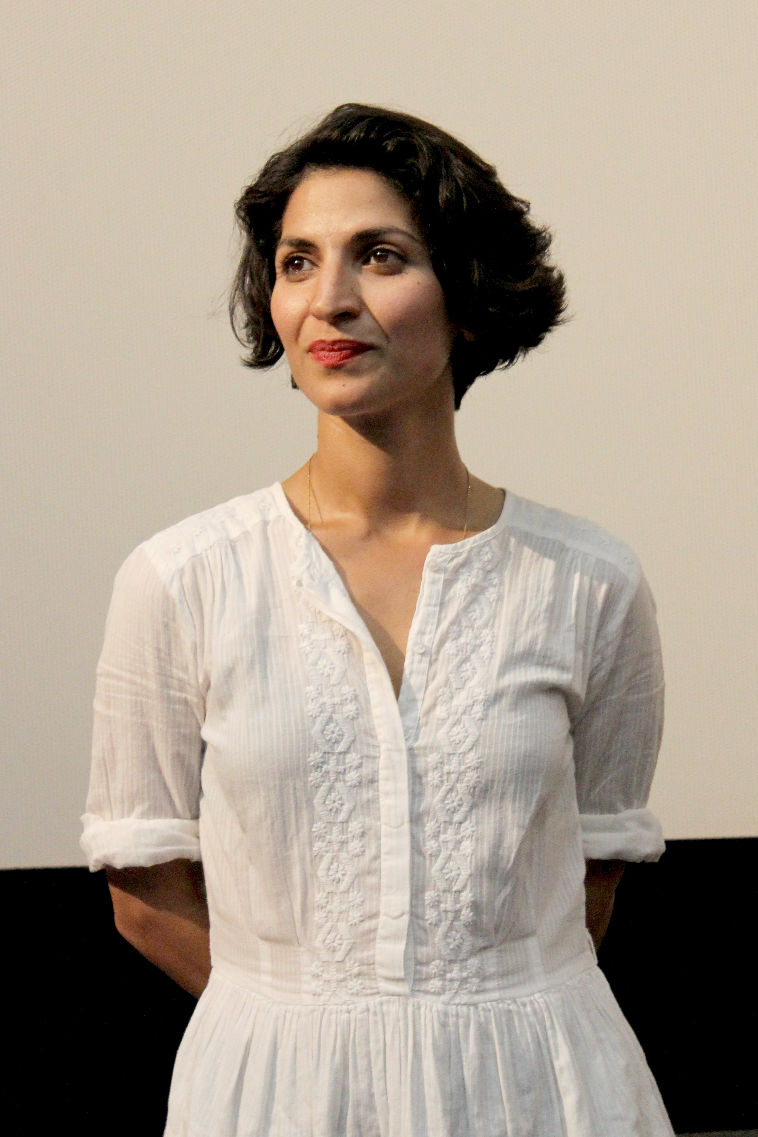 40223 Düsseldorf, Brunnenstraße 20. Filmvorstellung "Auf der Suche nach Oum Kulthum" im Metropol-Filmkunstkino. Neda Rahmanian (* 1978 in Teheran) ist eine deutsche Film- und Theaterschauspielerin iranischer Herkunft. Aufnahme von 2018.